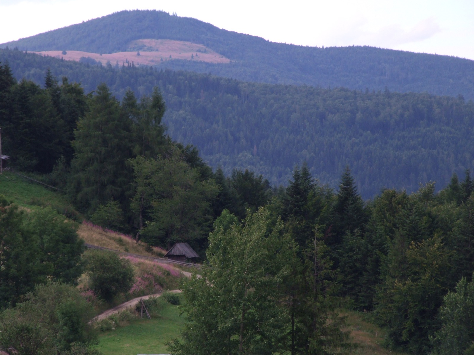 Przełęcz Przysłopek w Beskidzie Wyspowym.U góry Mogielica